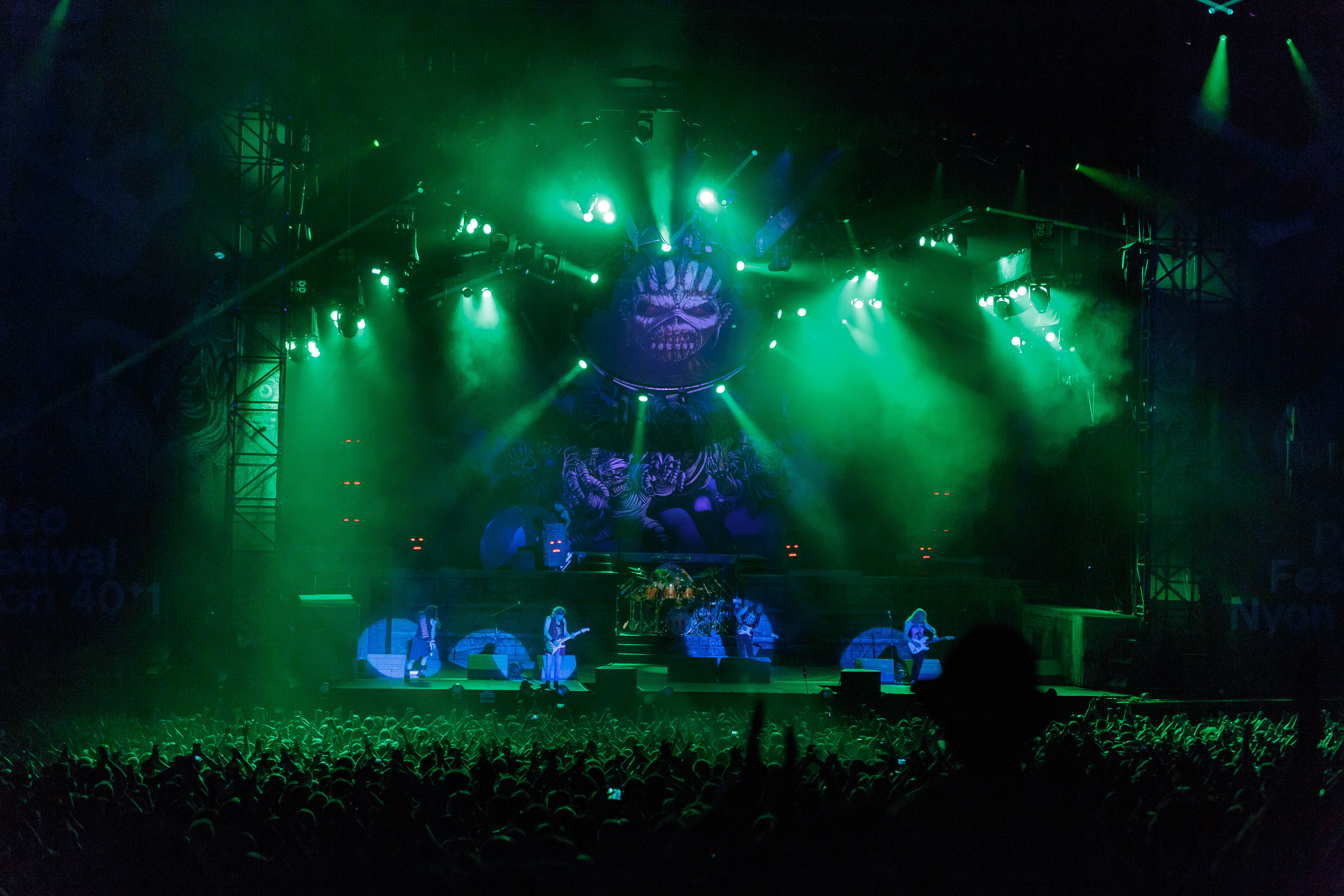 Paléo Festival Nyon, édition 2016, 19-24 juillet 2016. Mercredi 20: Iron Maiden (heavy-metal, Grande-Bretagne)